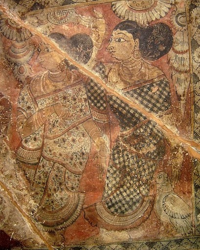 Sari worn during Vijayanagara dynasty 16 CE.